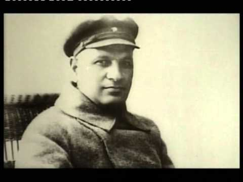 Ալեքսանդր Մյասնիկյան